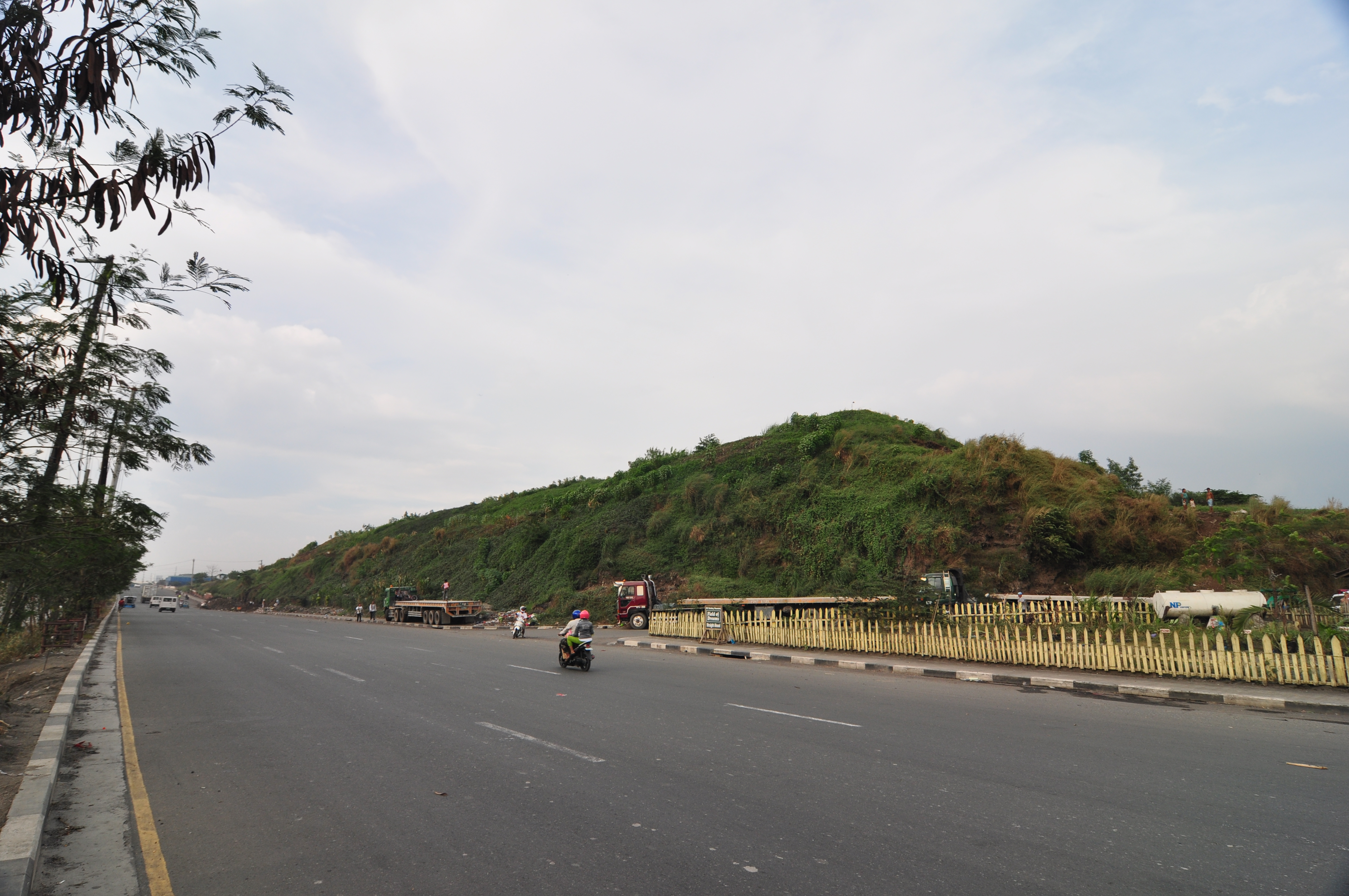 Smokey Mountain in Manila, Philippines